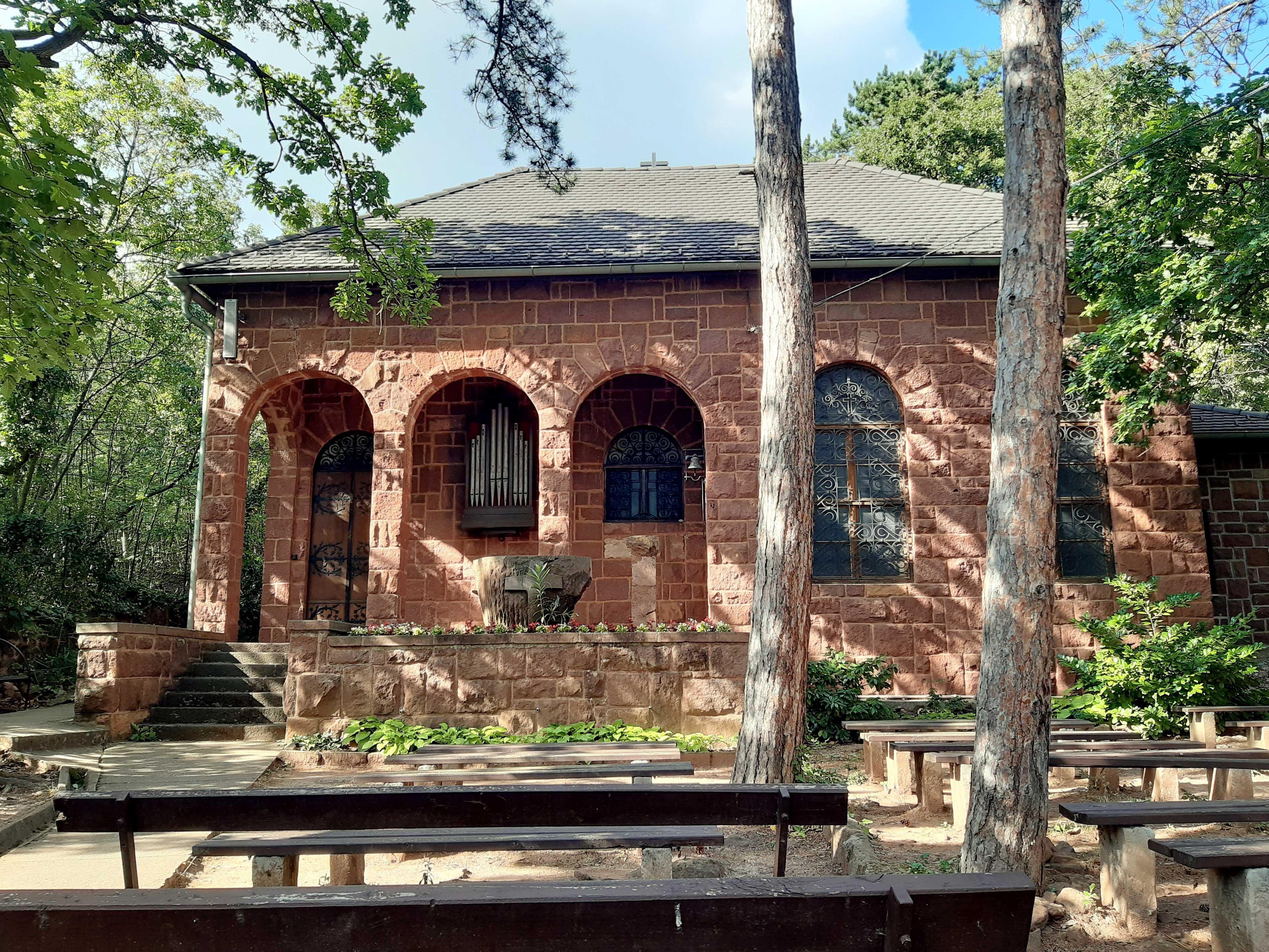 Káptalanfüredi Angyalos Boldogasszony Kápolna